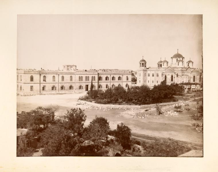 Автор Ф.М. Тимон